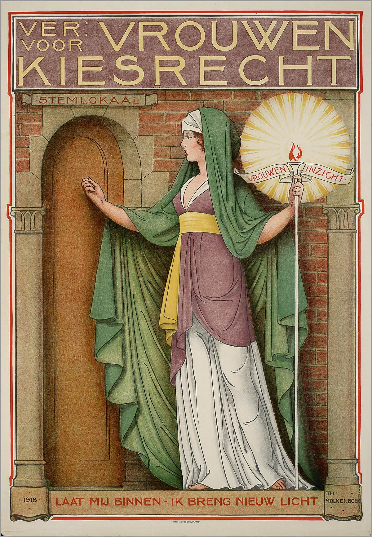 Affiche:"Vereeniging voor Vrouwenkiesrecht. Laat mij binnen - ik breng nieuw licht."